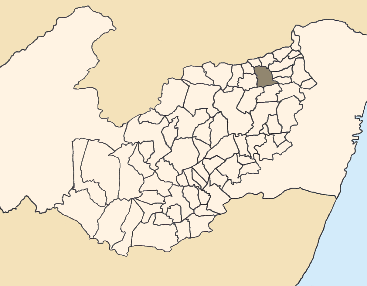 Mapa da mesorregião Agreste de Pernambuco (Brasil) subdivida em municípios. Em destaque, o município de Surubim. Map of the brazilian state of Pernambuco (mesorregião Agreste) showing the city of Surubim. Imagem tratada com o GIMP. Image made with GIMP.